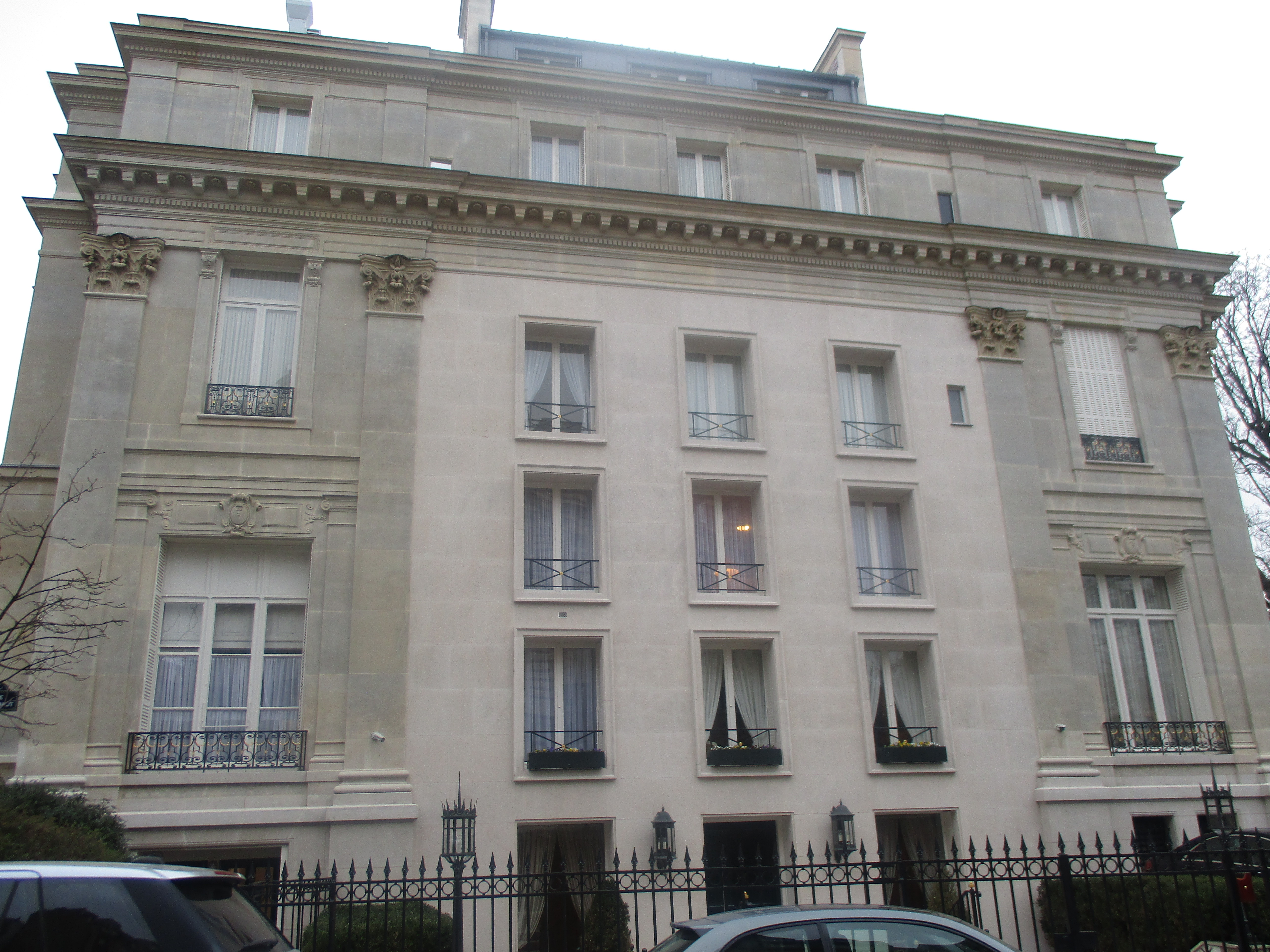 19 rue Rembrandt, ancien hôtel particulier de James Stillman.